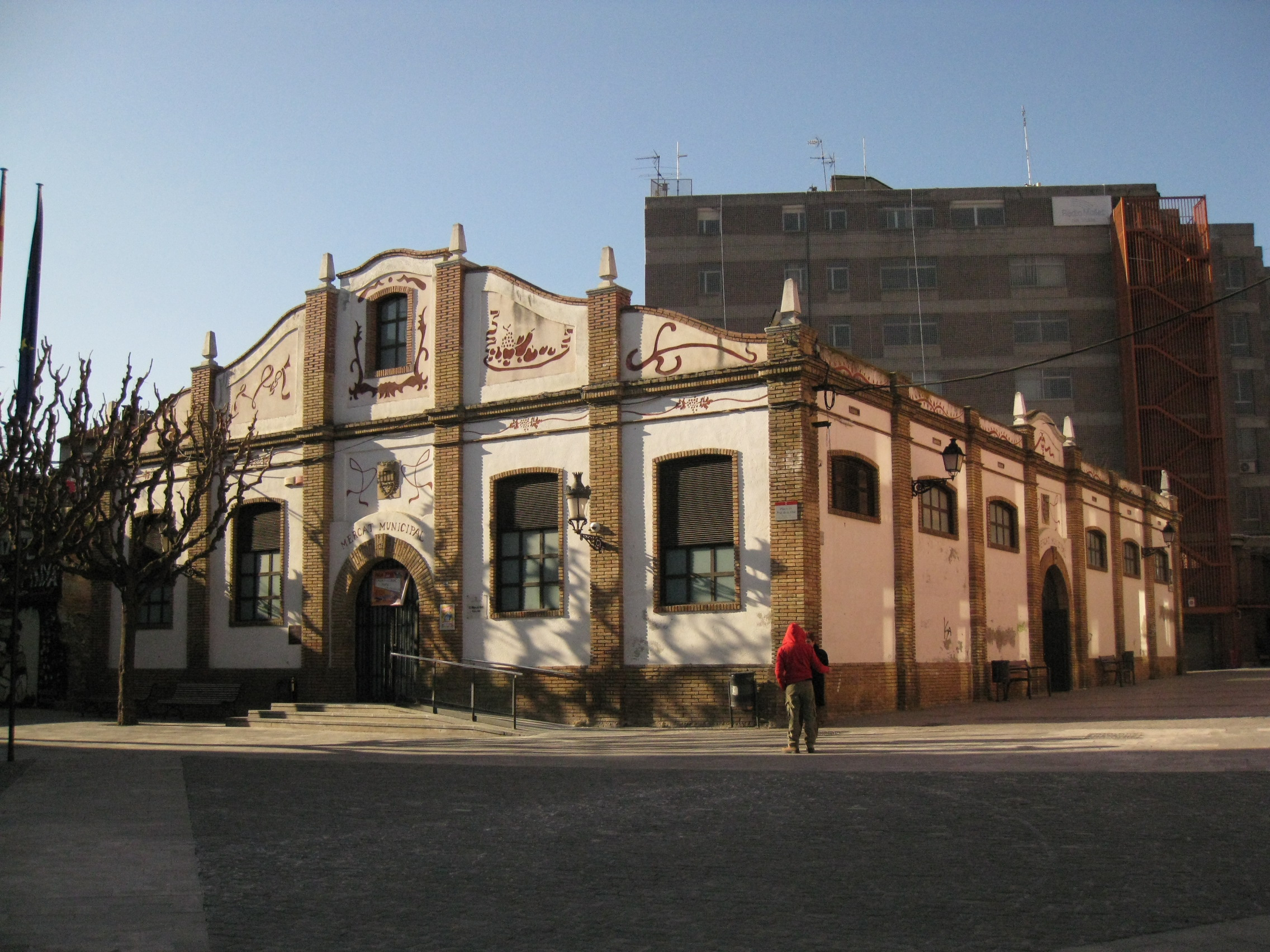 Antic mercat municipal (Mollet del Vallès)